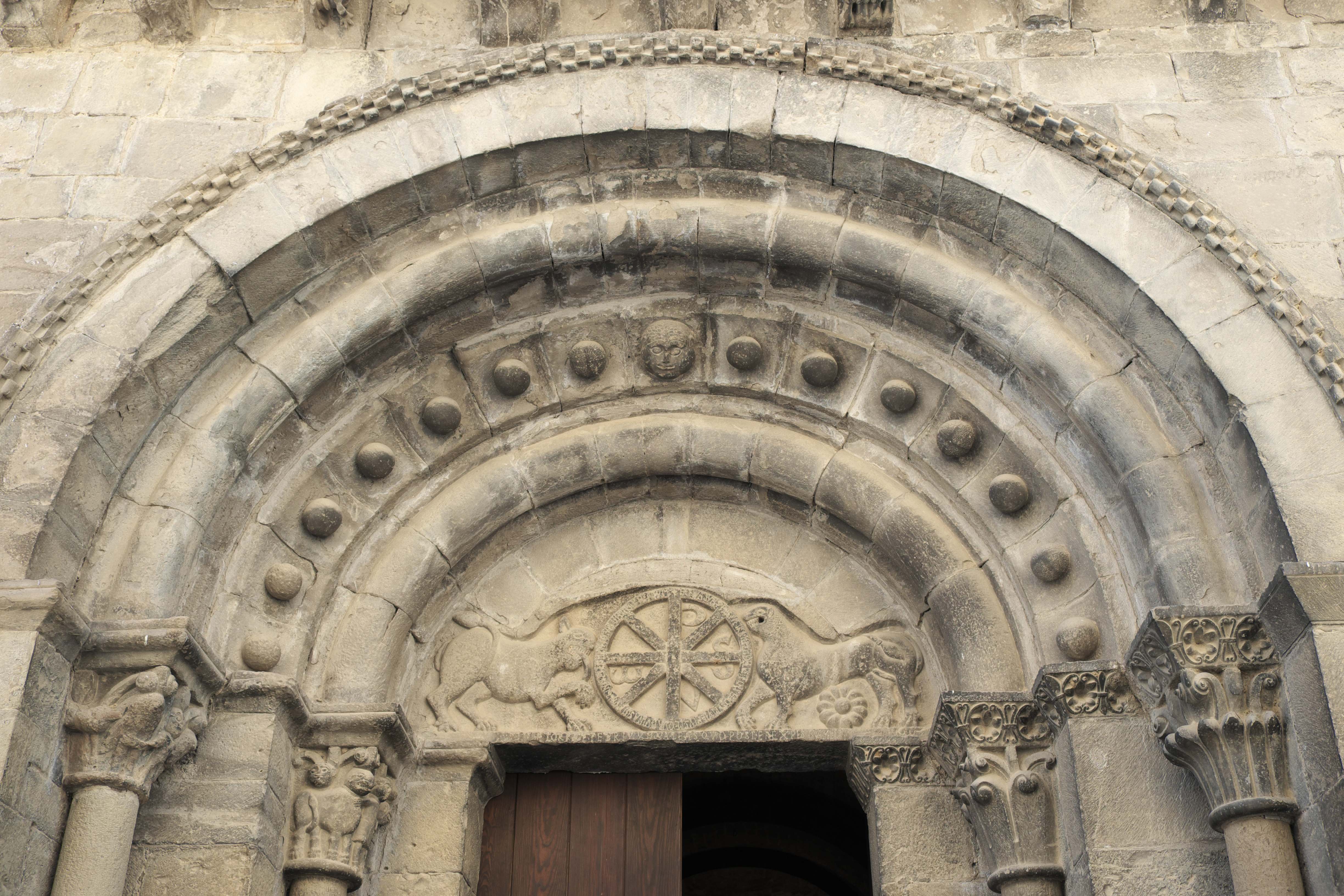 Pfarrkirche und ehemalige Klosterkirche Santa María in Santa Cruz de la Serós in der Provinz Huesca (Aragón/Spanien), Portal an der Westfassade